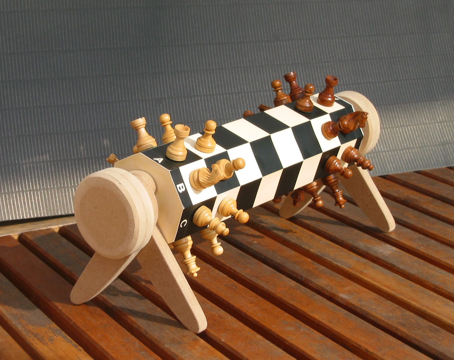 Un jeu d'échecs Cylindrique que j'ai inventé.